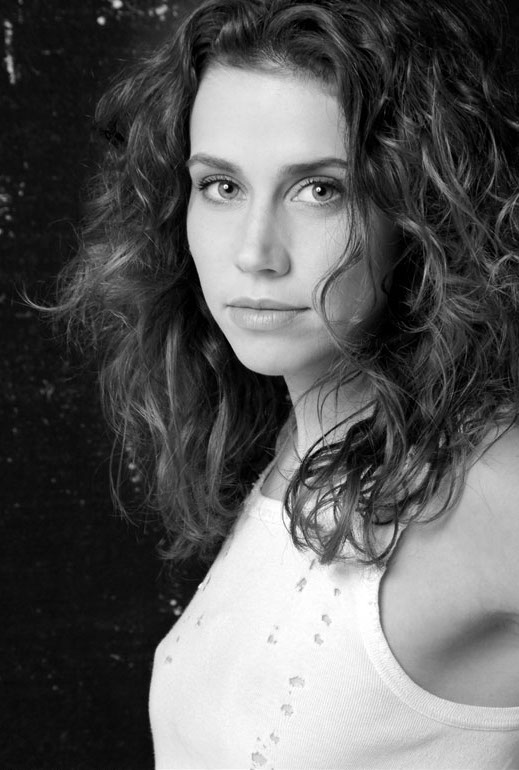 ליאת אזר